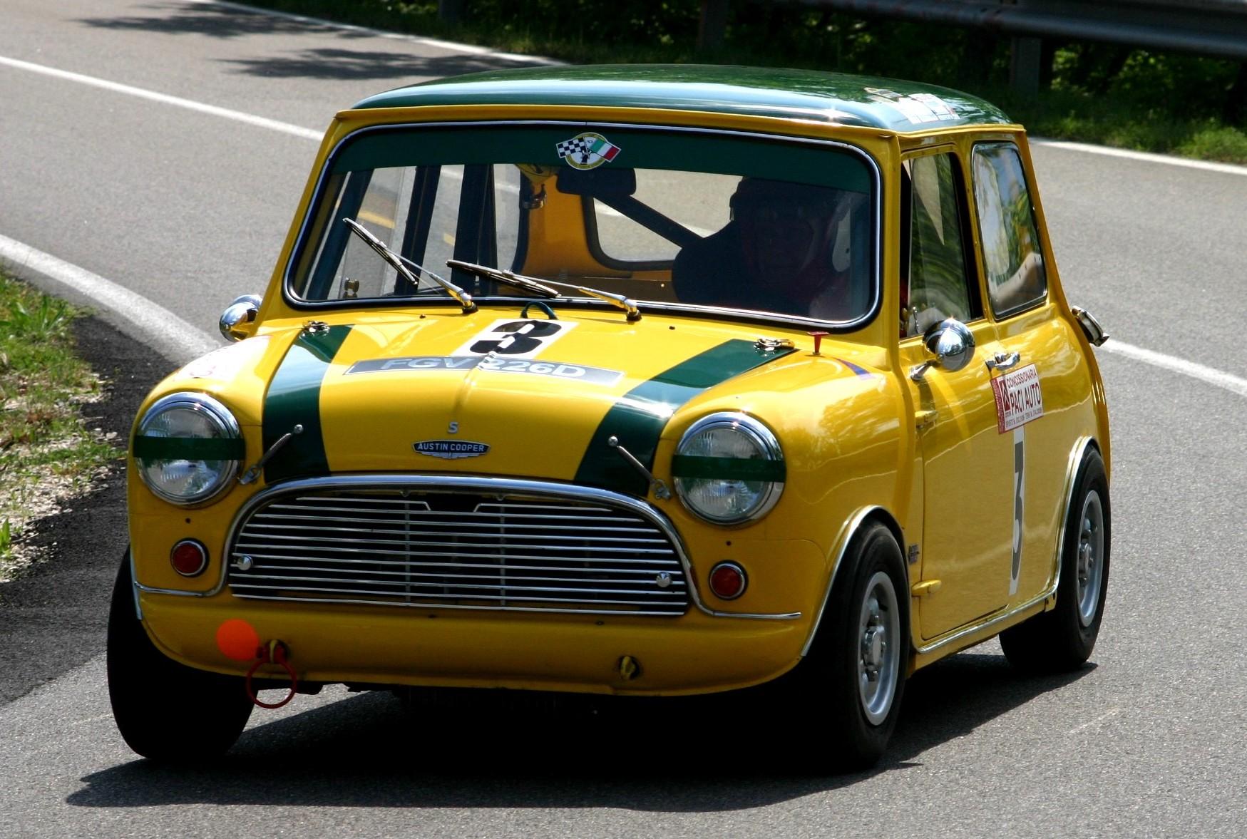 Mini Cooper S preparata per le competizioni durante la Cronoscalata della Castellana (Orvieto).